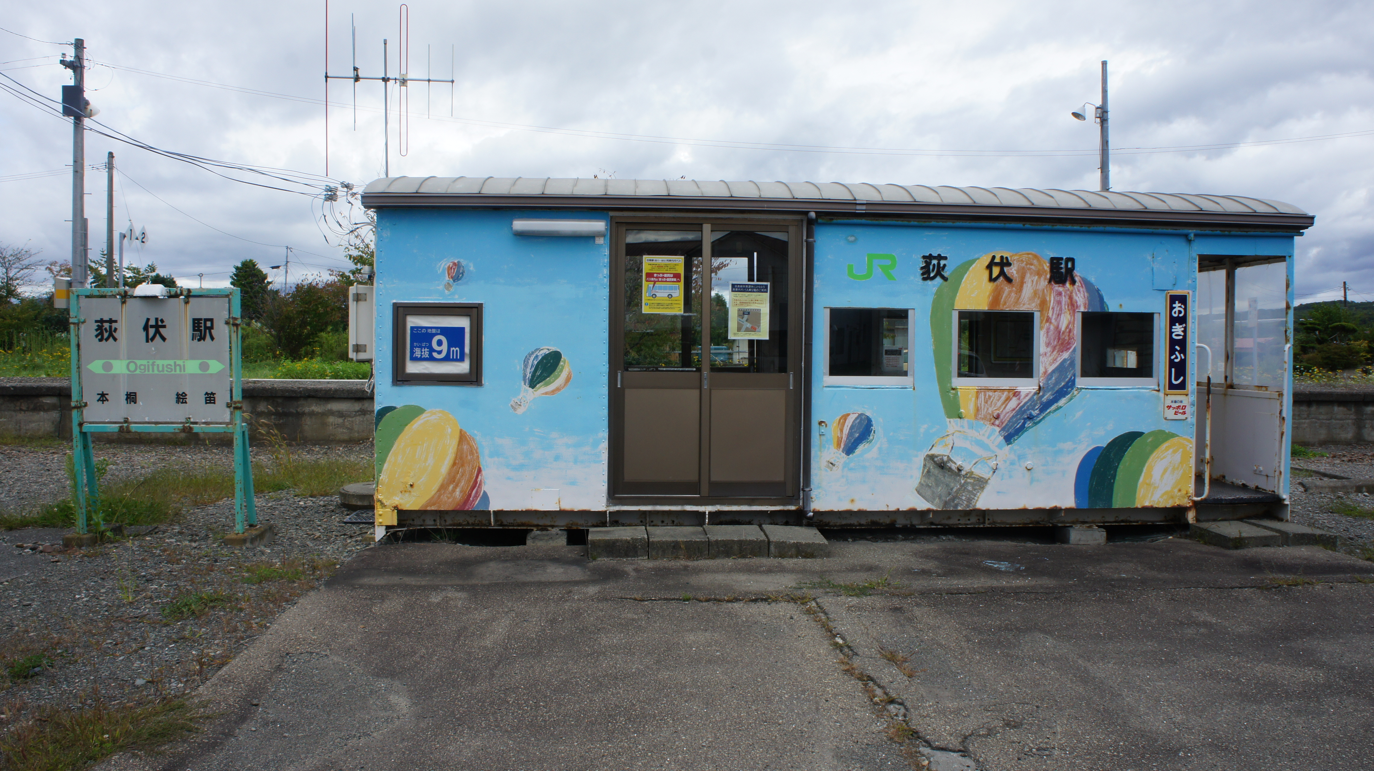 JR日高本線・荻伏駅の駅舎